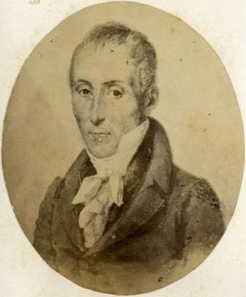 Asume como virrey del Virreinato del Rio de la Plata en el año 1778, bajo su gobierno se realizó el primer censo de Buenos Aires, participó activamente en la fundación del Teatro de la Ranchería. Esta es una reproducción fotográfica de un retrato pictórico poco conocido.